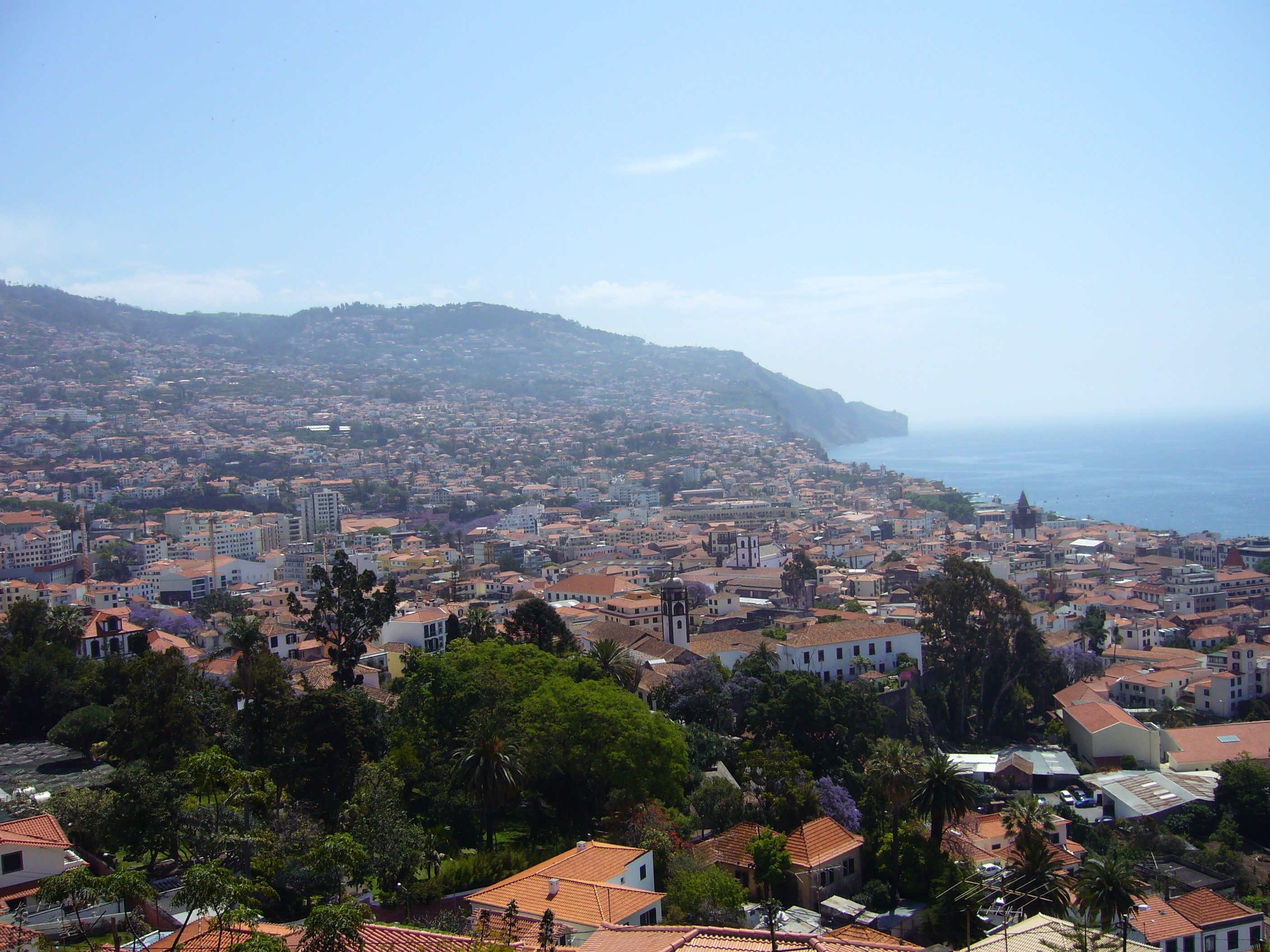 Pohled na Funchal z Fortaleza do Pico.